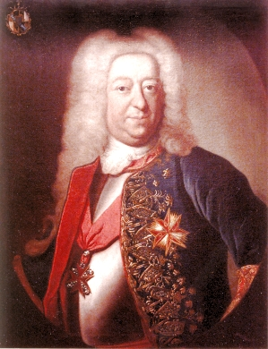 Graf Ferdinand Andreas von Wiser (1677-1751), kurpfälzischer Beamter und Diplomat